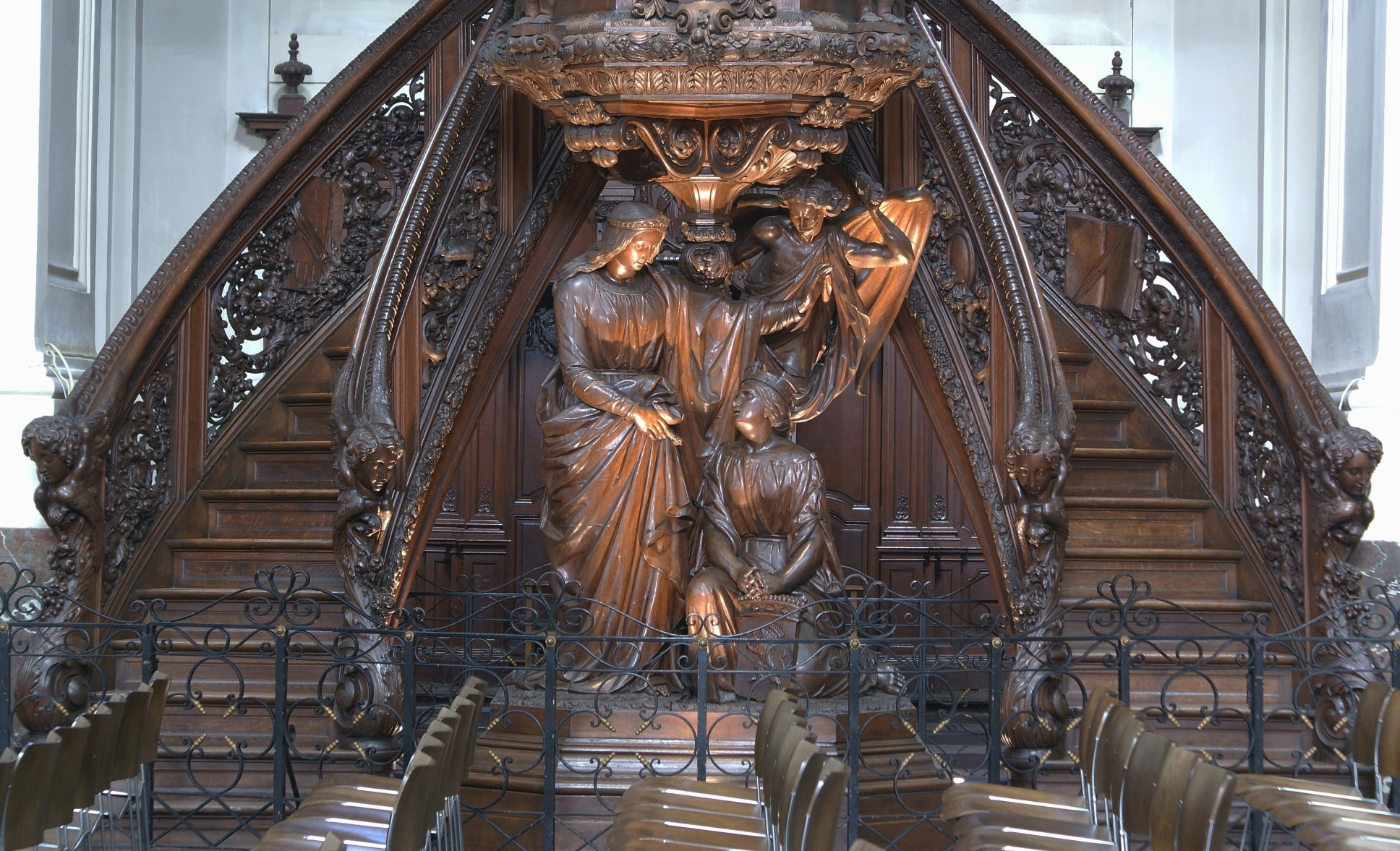 Cathédrale de St-Aubain (Namur) - Chaire de vérité sculpté par Charles Geerts (détail 1)